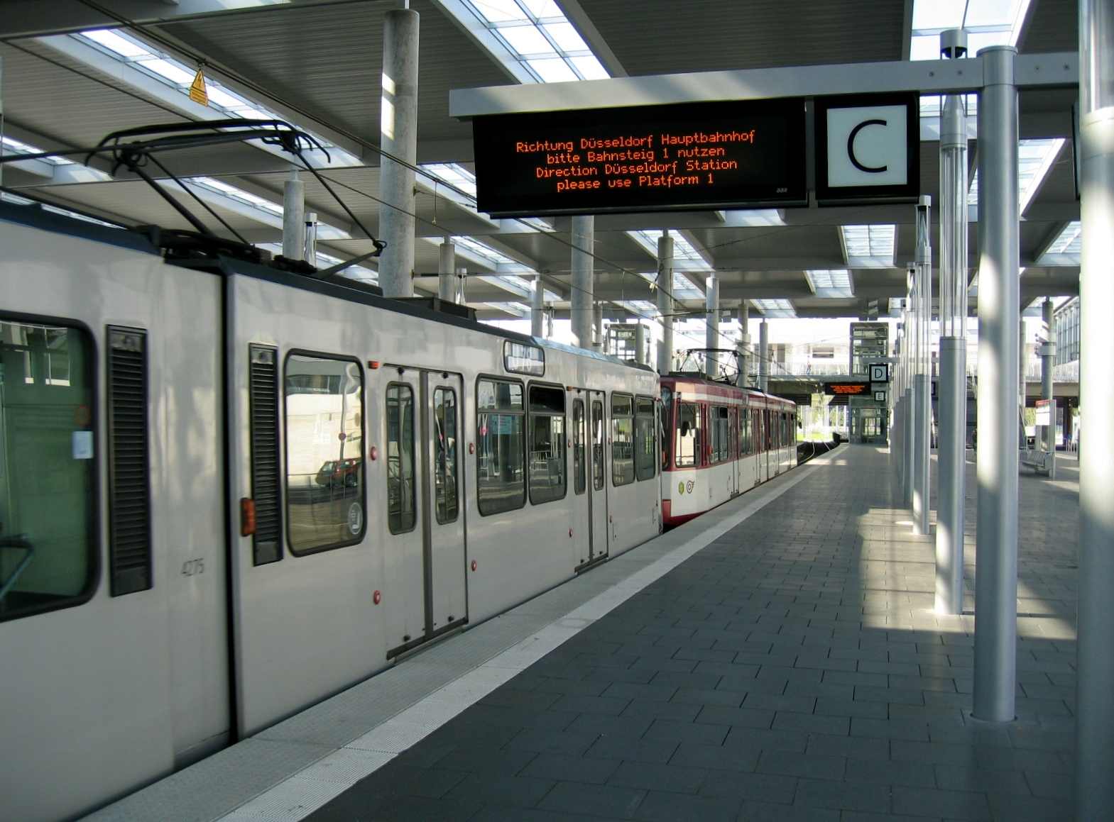 Description: Düsseldorf, U-Bahn-Station Messe Nord, U-78 (=Linie 718 von 1981 bis 1988), Rheinbahn Source: selbst fotografiert Date: 30. Aug. 2005 Author: Asio otus